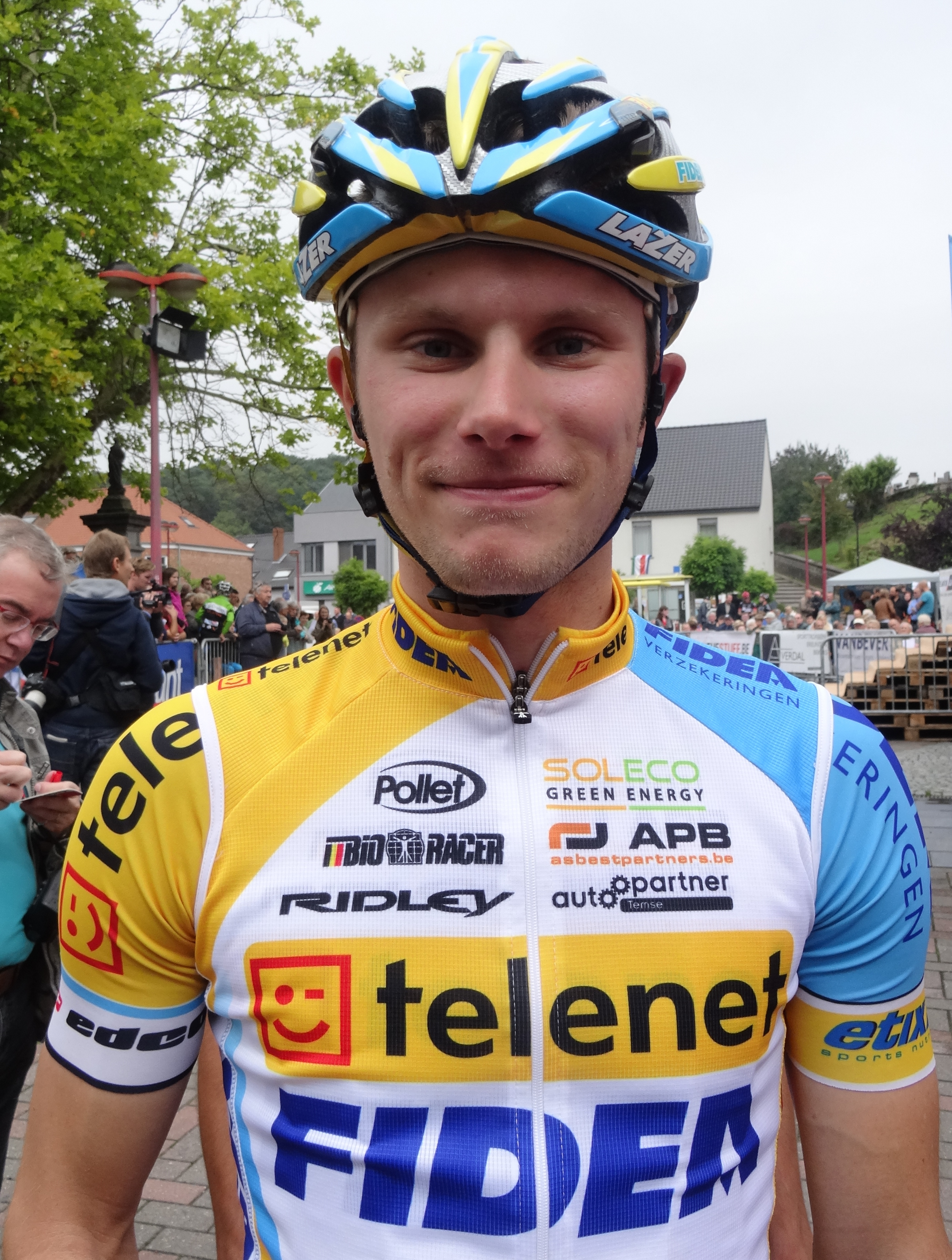 Reportage photographique réalisé le mercredi 27 août à l'occasion du départ de la Druivenkoers Overijse 2014 à Huldenberg, Belgique.